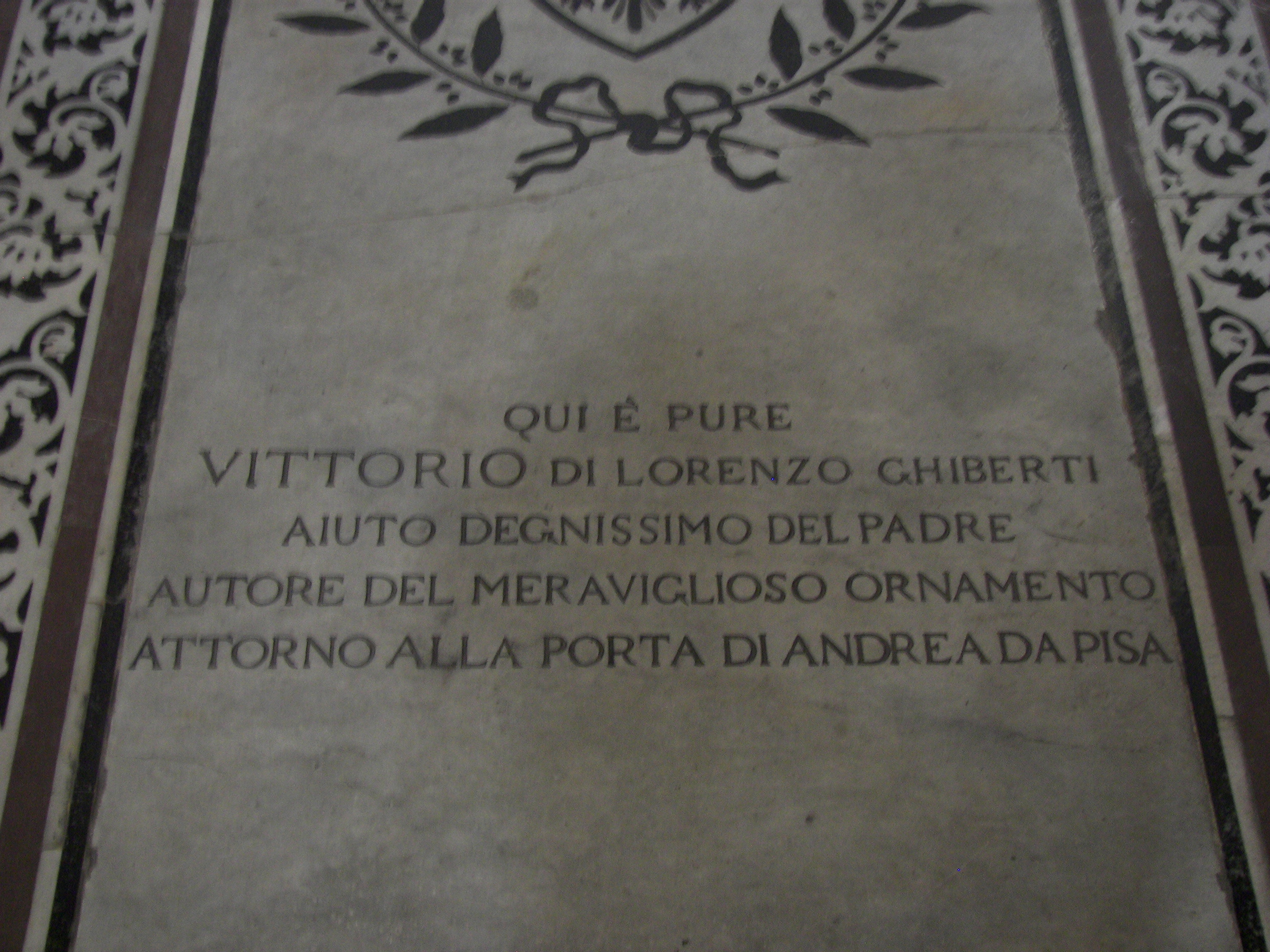 Closeup of the grave of Lorenzo Ghiberti and Vittorio Di Lorenzo Ghiberti in Santa Croce in Firenze.